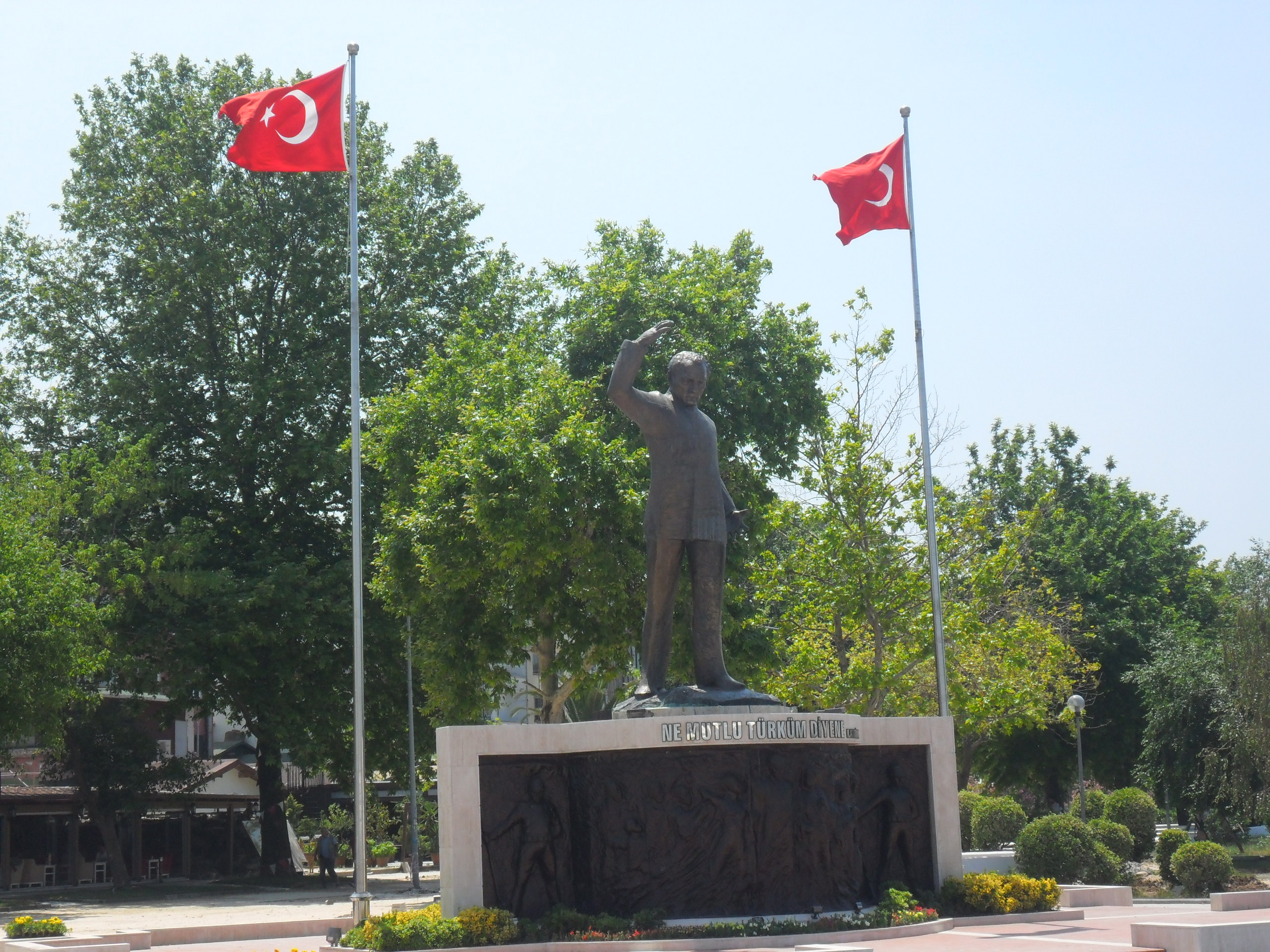 Yalova Meydanı'nda bulunan Atatürk Heykeli.